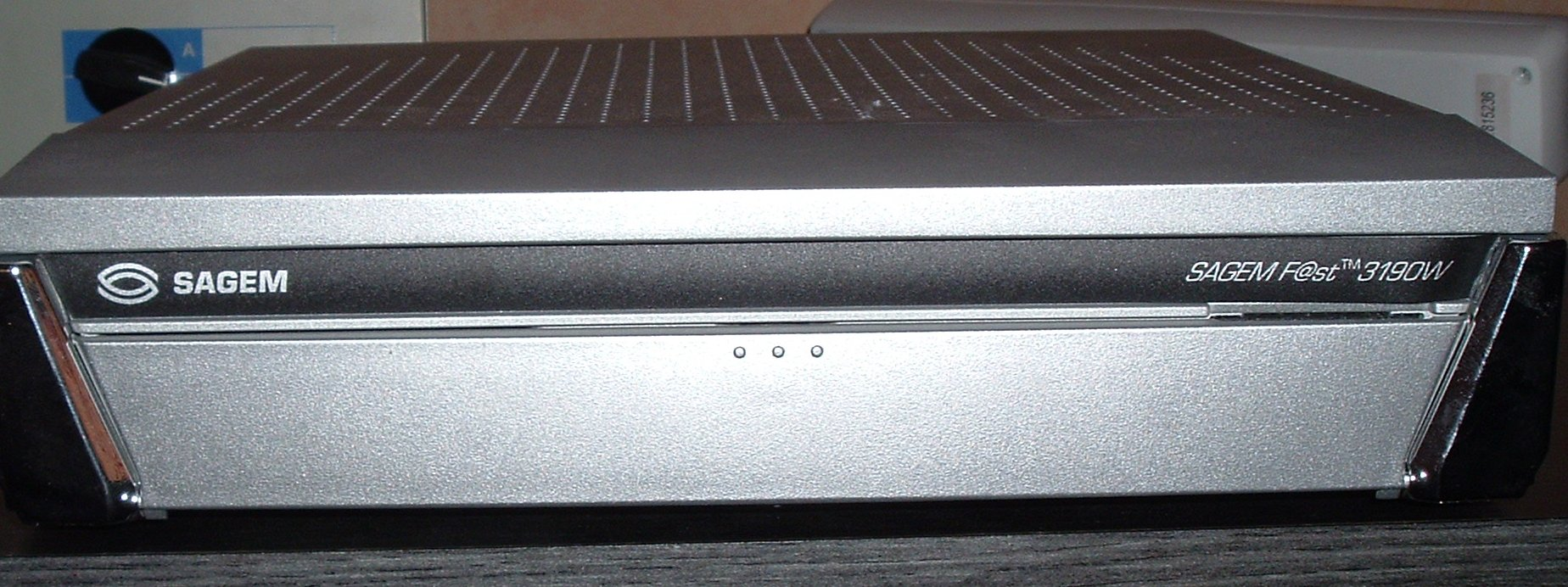 Sagem F@st 3190w